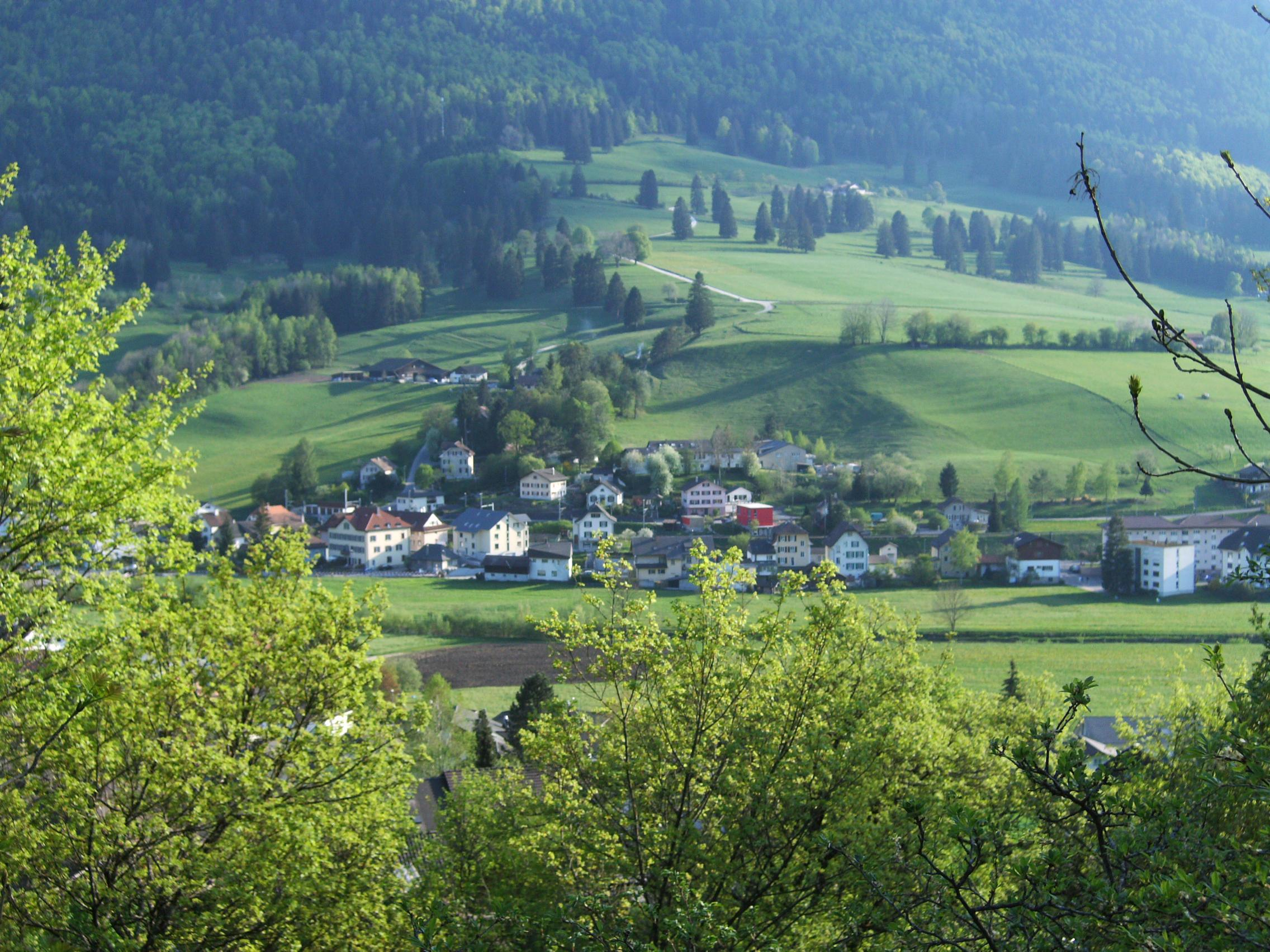 Sonceboz-Sombeval (BE, Suisse). Prise de vue depuis le nord.